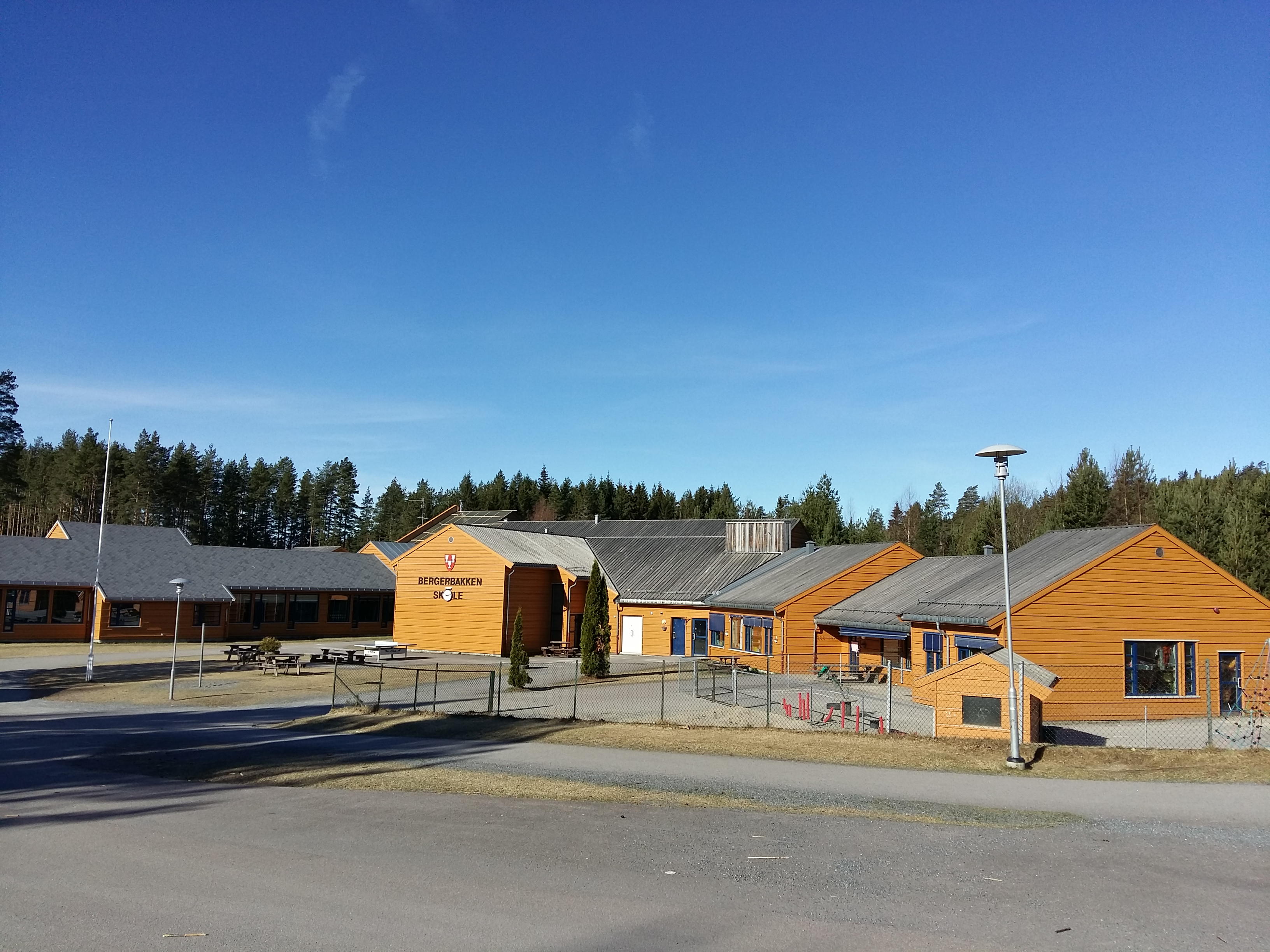 Bergerbakken skole på Jevnaker i Buskerud fylke.